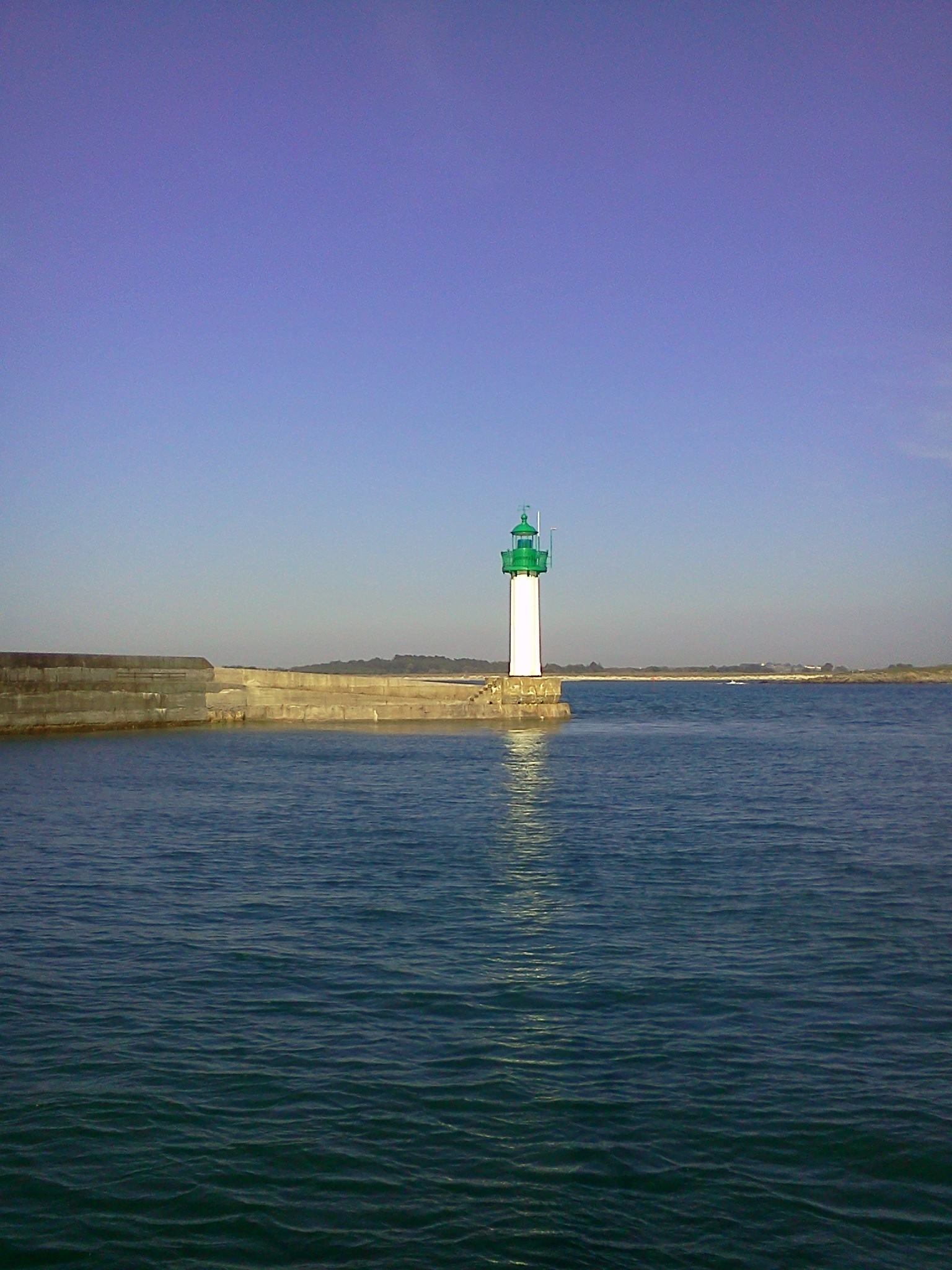 vue de la jetée et du phare de Moguériec